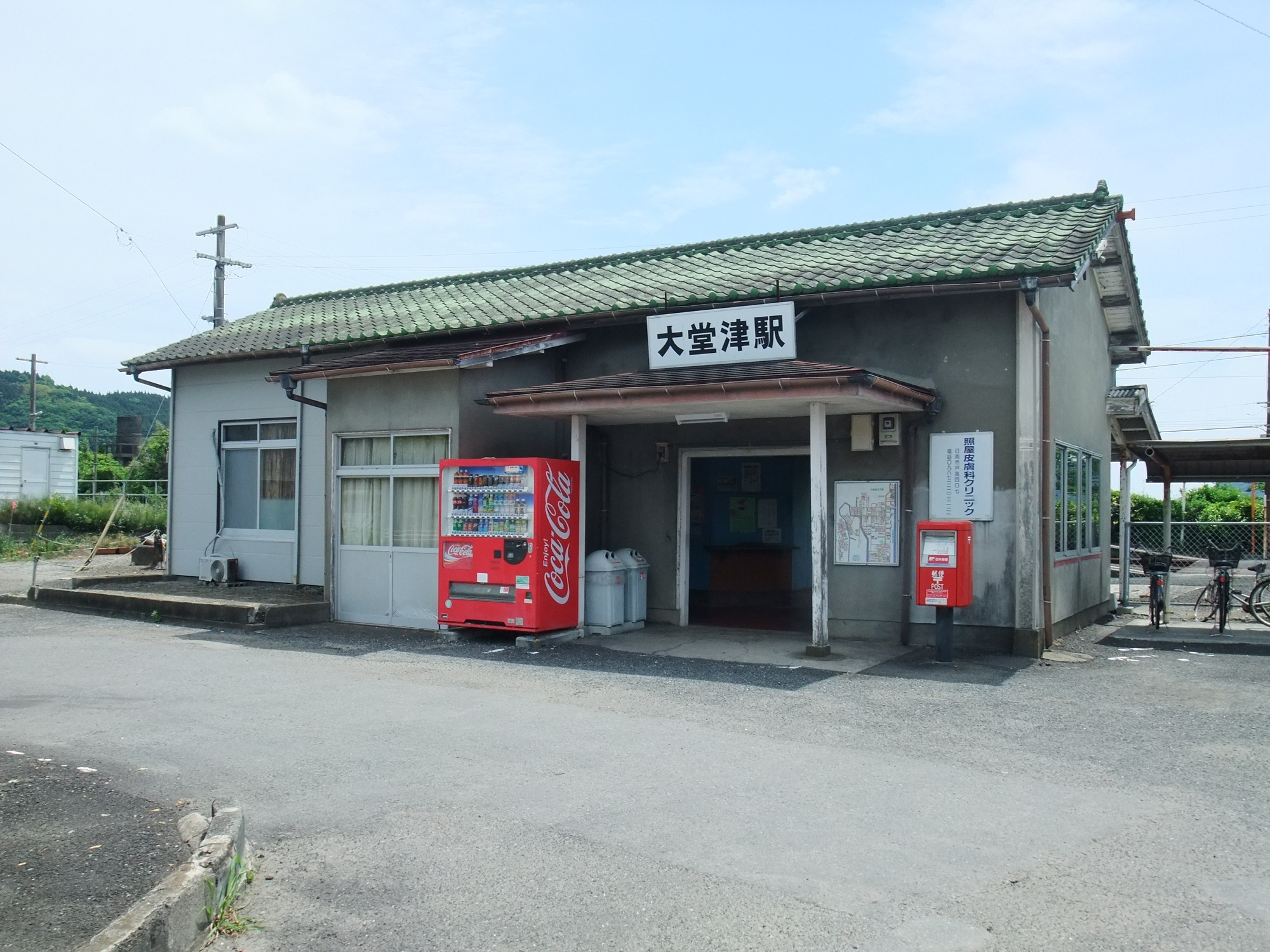 日南線大堂津駅